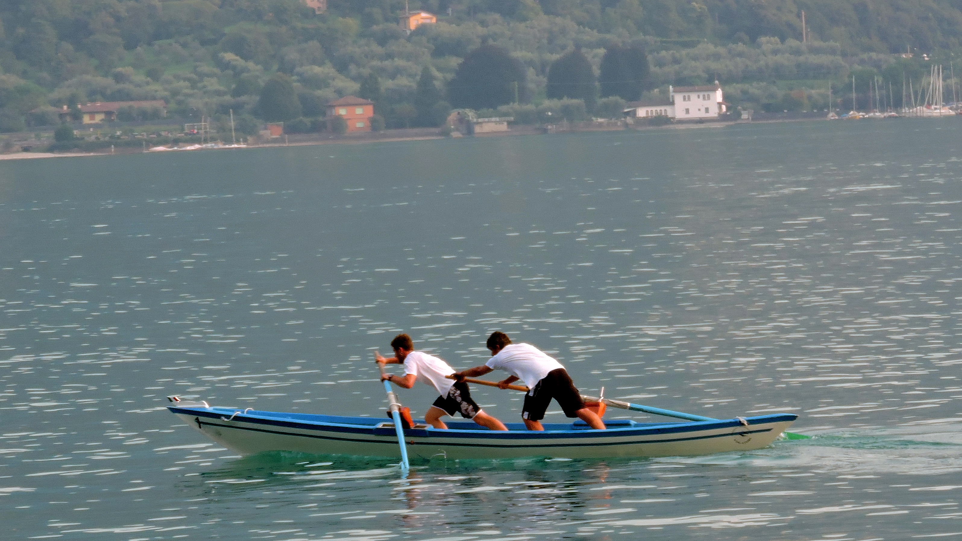 Un naét presso Monte Isola (lago di Iseo, BS)